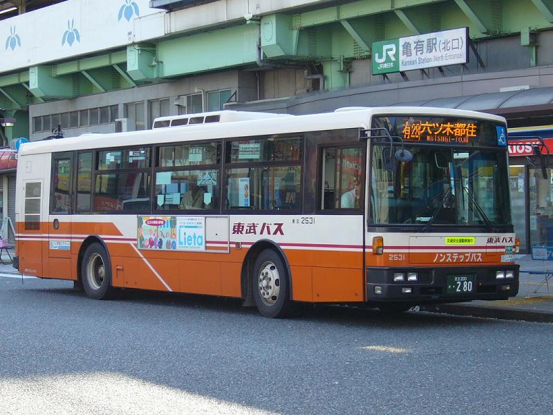 登録番号 足立200か・280 東武バスセントラル葛飾営業所所属 車番2531 2005年9月29日 亀有駅前にて撮影